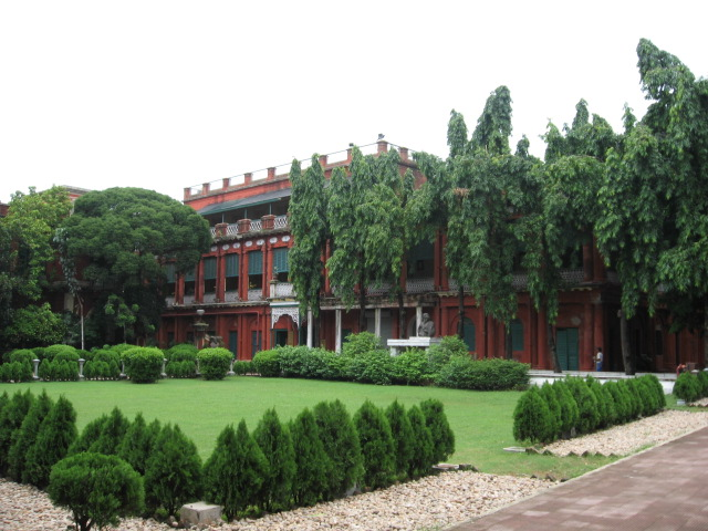 Jorasanko Thakur Bari, now Rabindra Bharati University, West Bengal, India